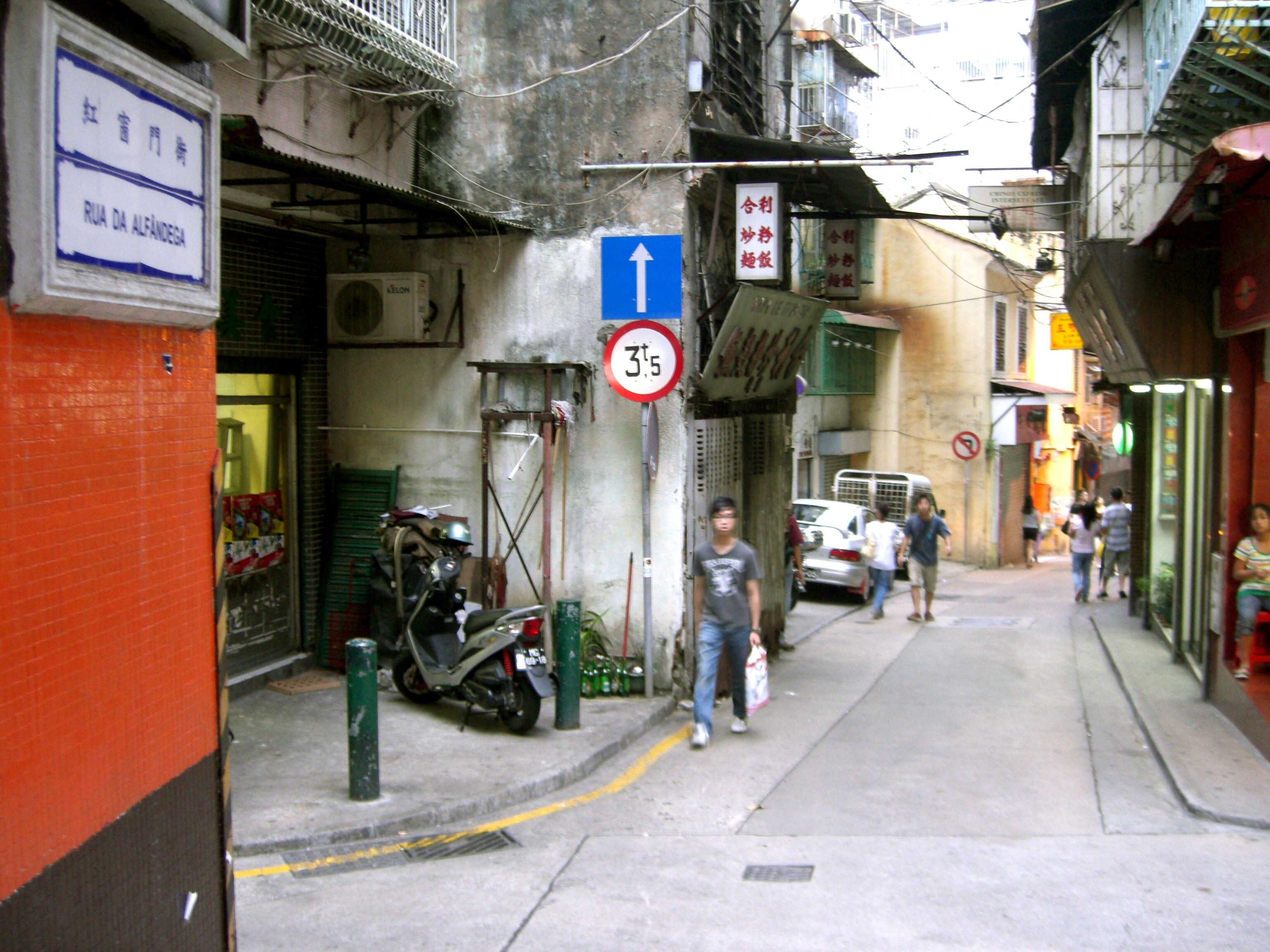 Rua da Alfândega